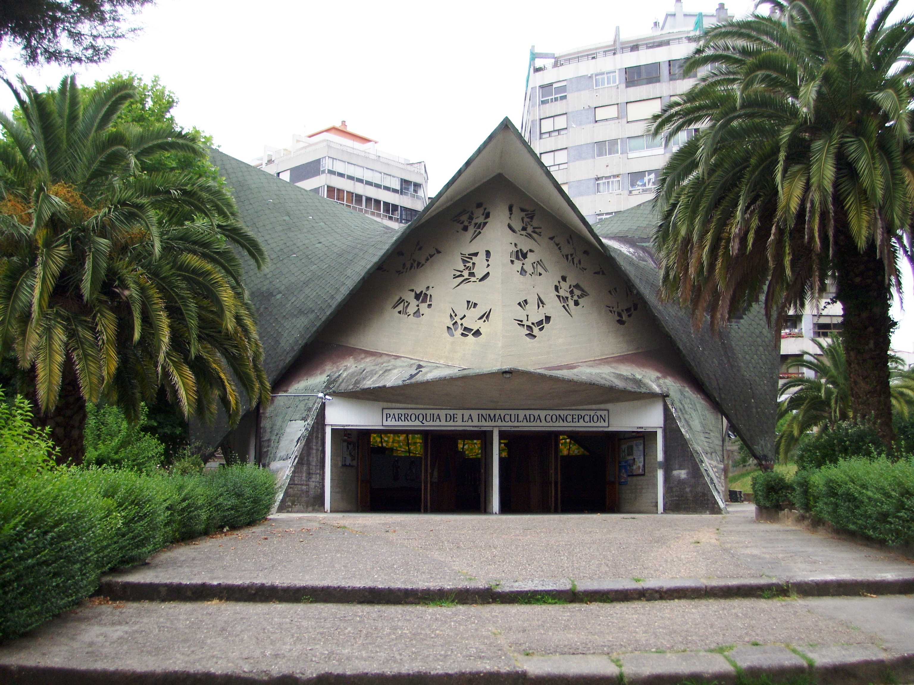 Igrexa parroquial da Inmaculada Concepción do arquitecto Antonio Román Conde, 1968, Vigo